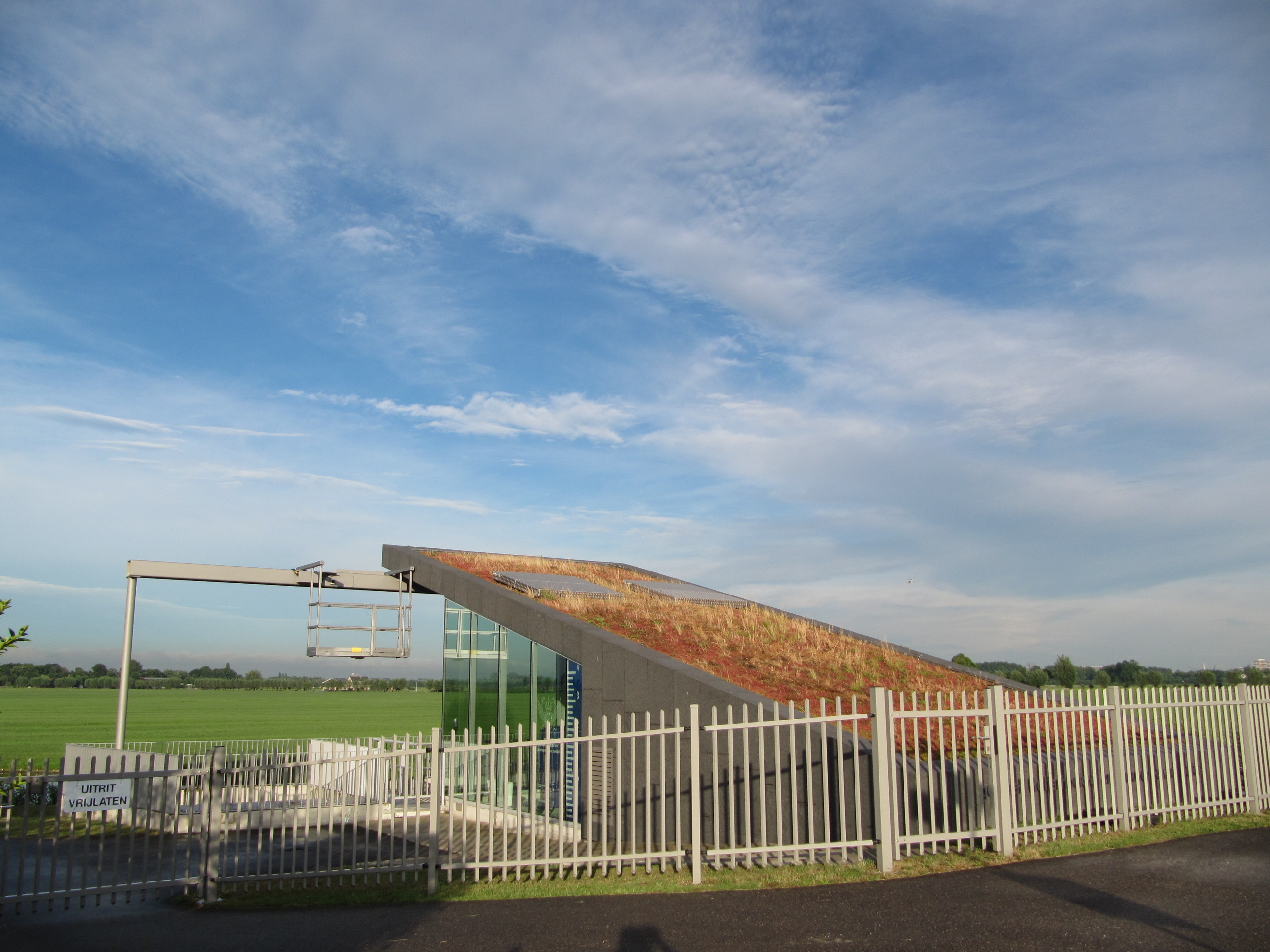 Gemaal Holierhoekse- en Zouteveense polder (nieuw).jpg